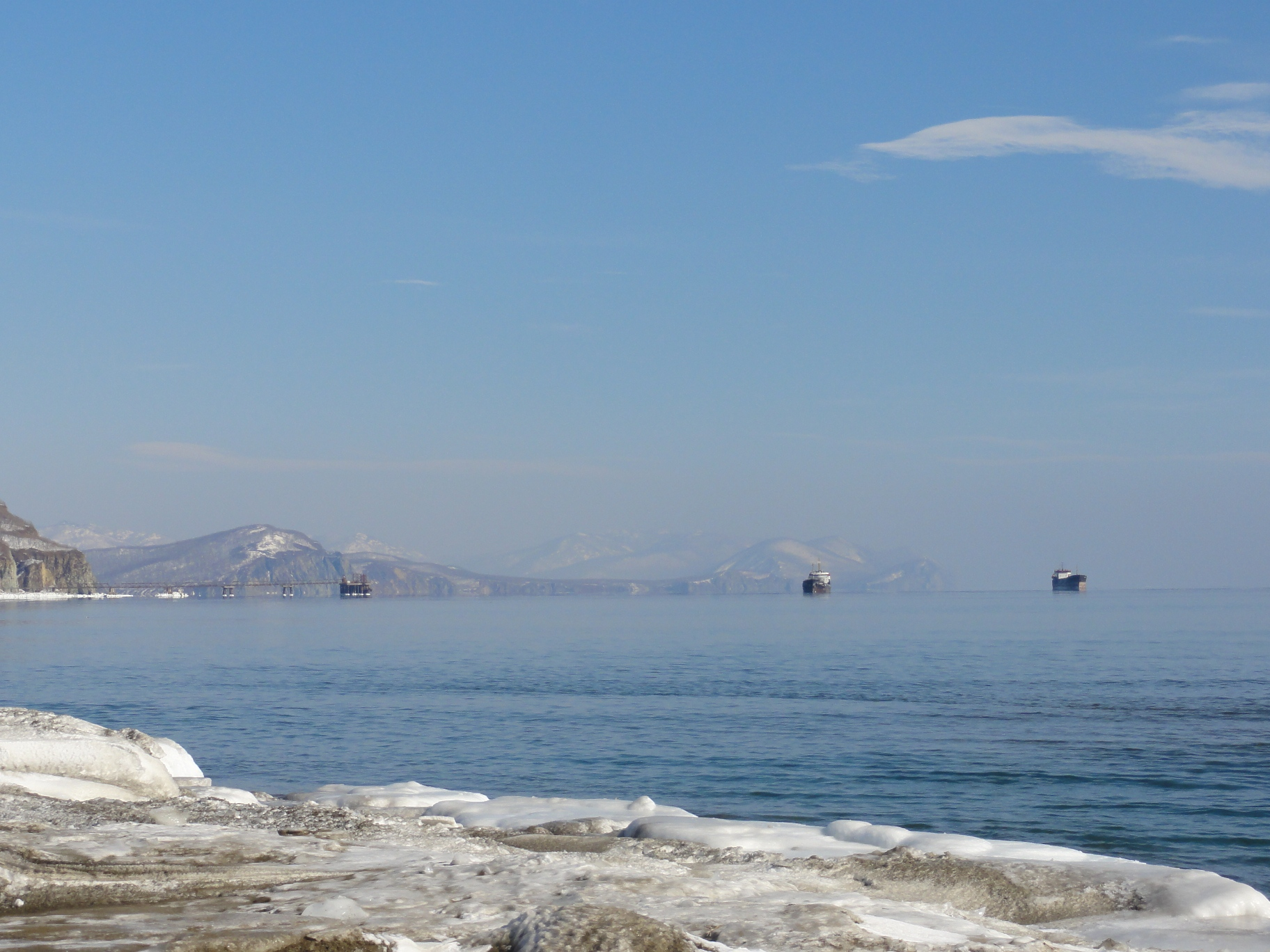 Корабли на рейде в бух. Рудная